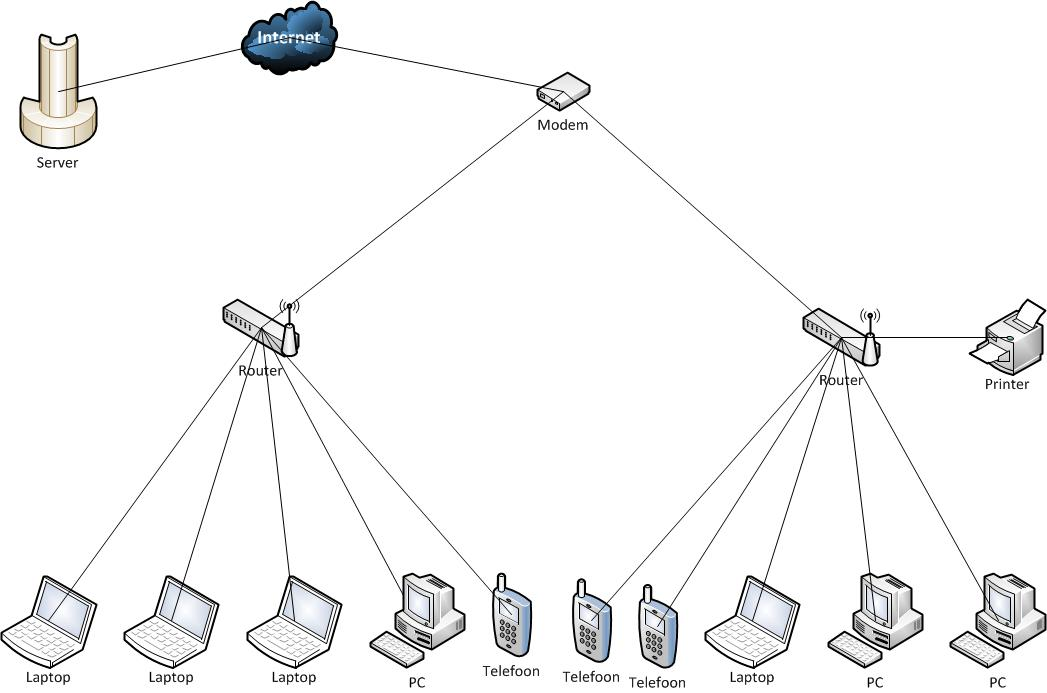 Een schema van een simpele netwerkconfiguratie ter illustratie van het begrip node.